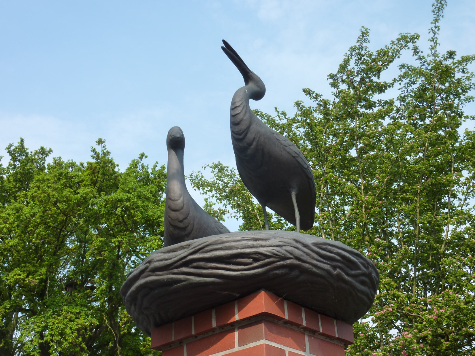 Denkmal für Störche in Wardenburg